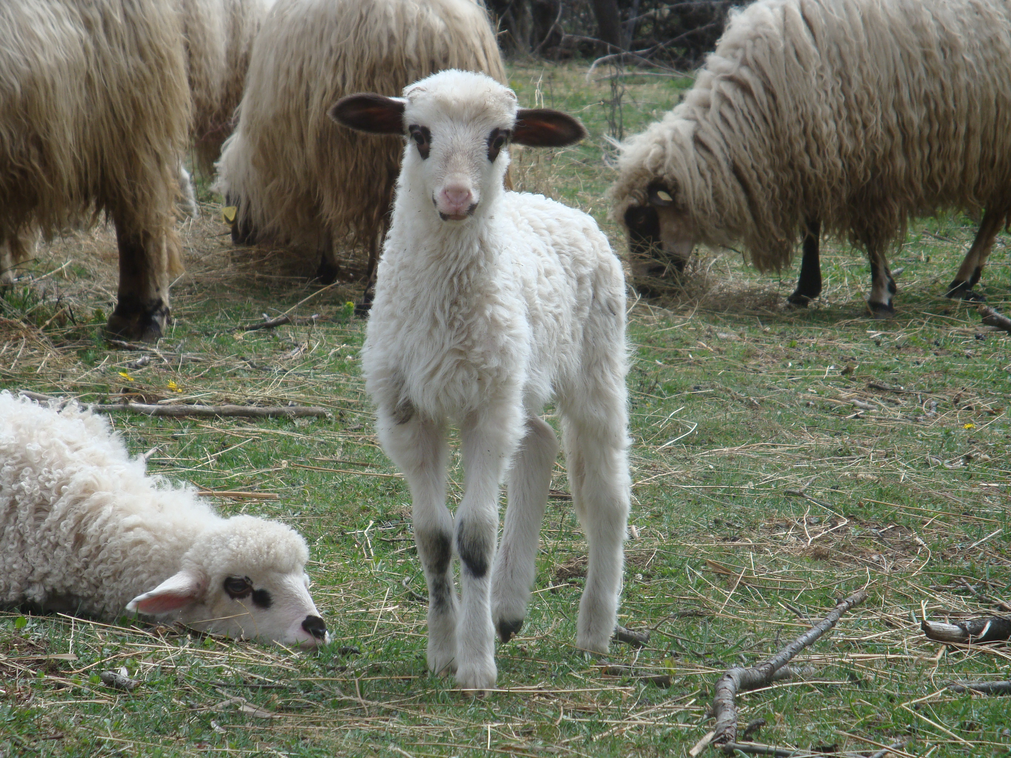 Јагње